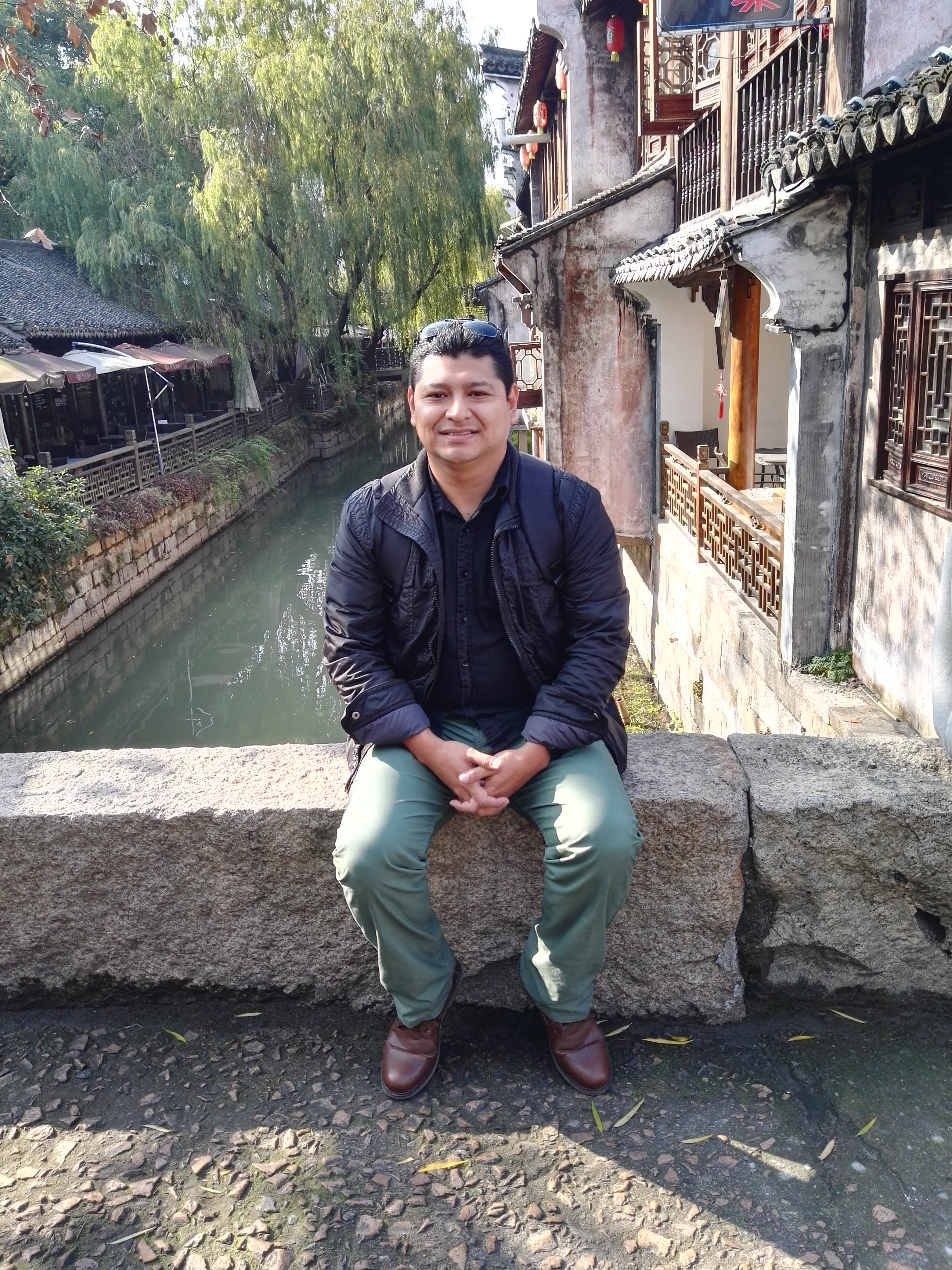 Fotografía tomada en 2019, en la provincia de Qhubo, Shanghai, China.